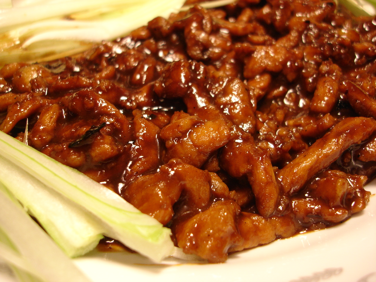 Jing Jiang Rou Si